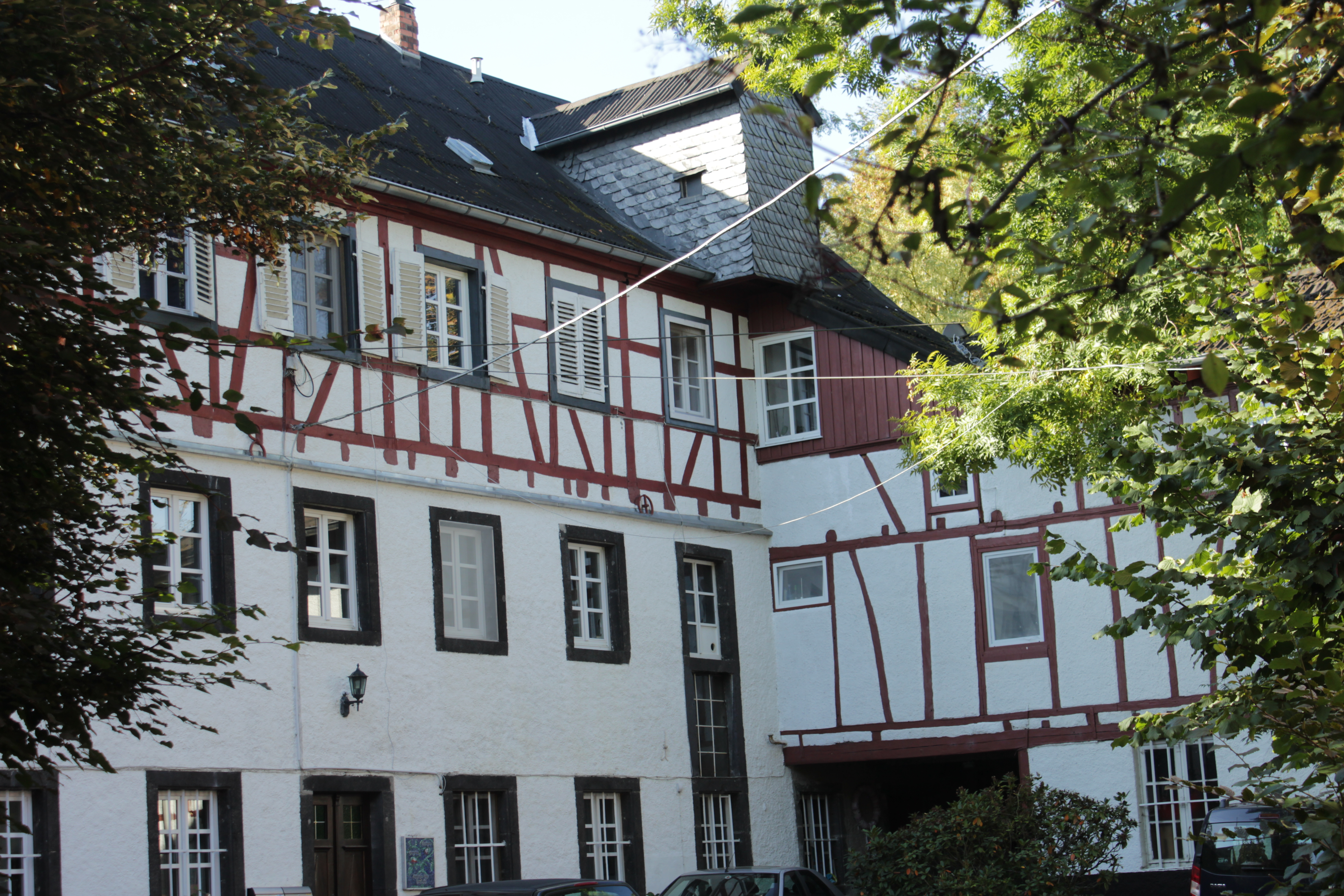 Lukasmühle (Hauptgebäude) bei Mülheim-Kärlich